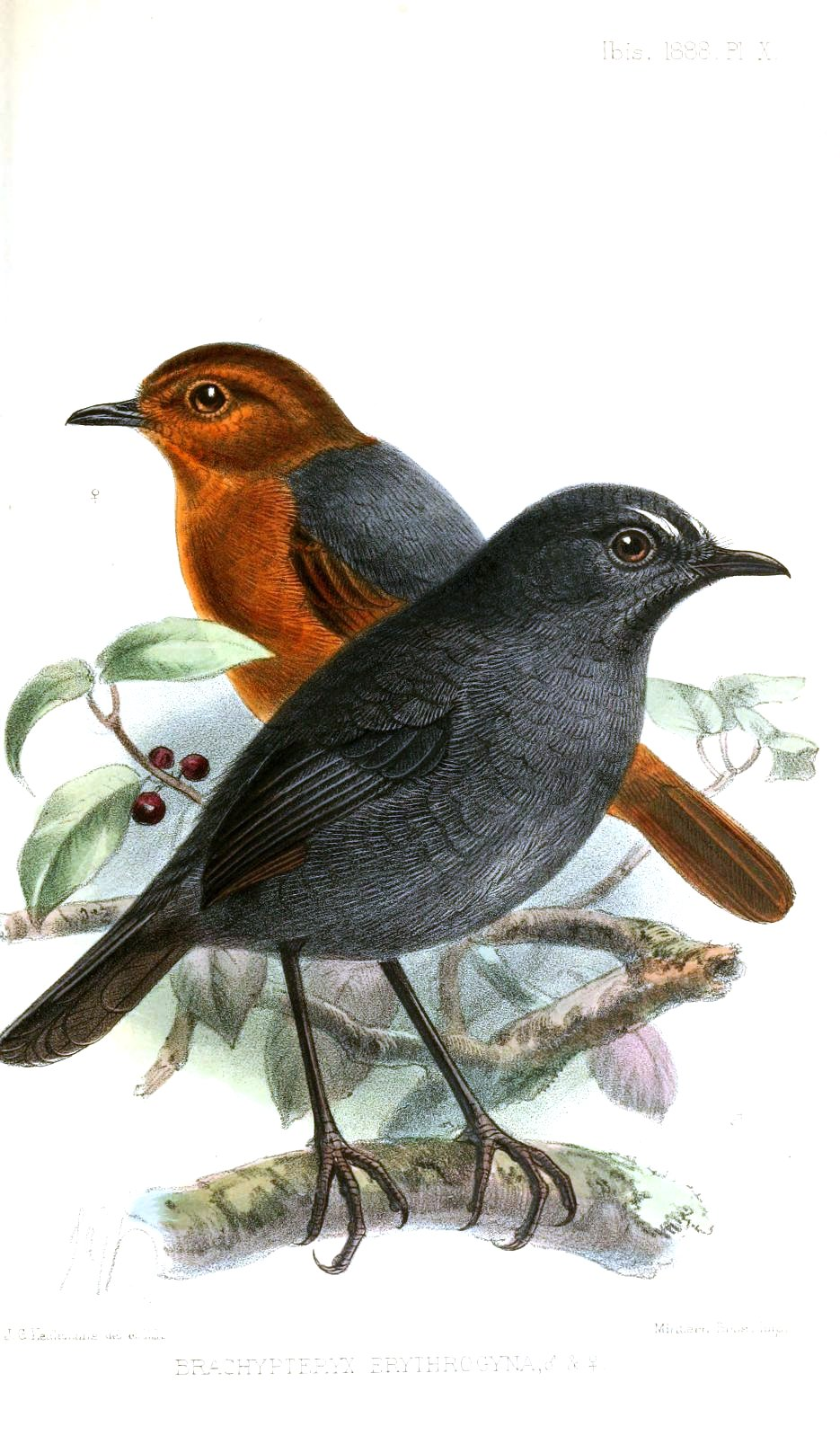 Brachypteryx montana erythrogyna ou Brachypteryx erythrogyna